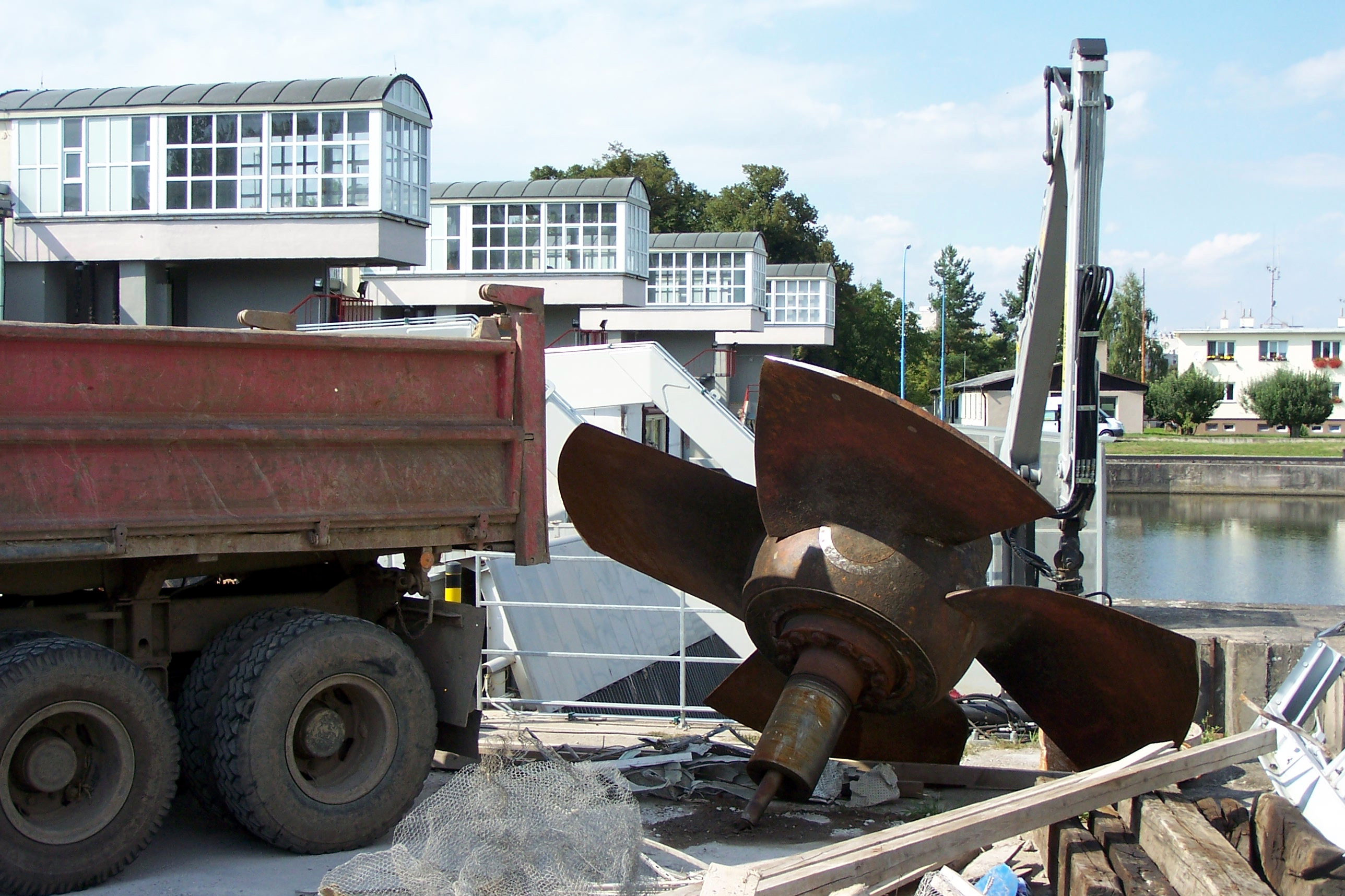 Zdymadlo v Pardubicích – části malé vodní elektrárny během rekonstrukce, kaplanka